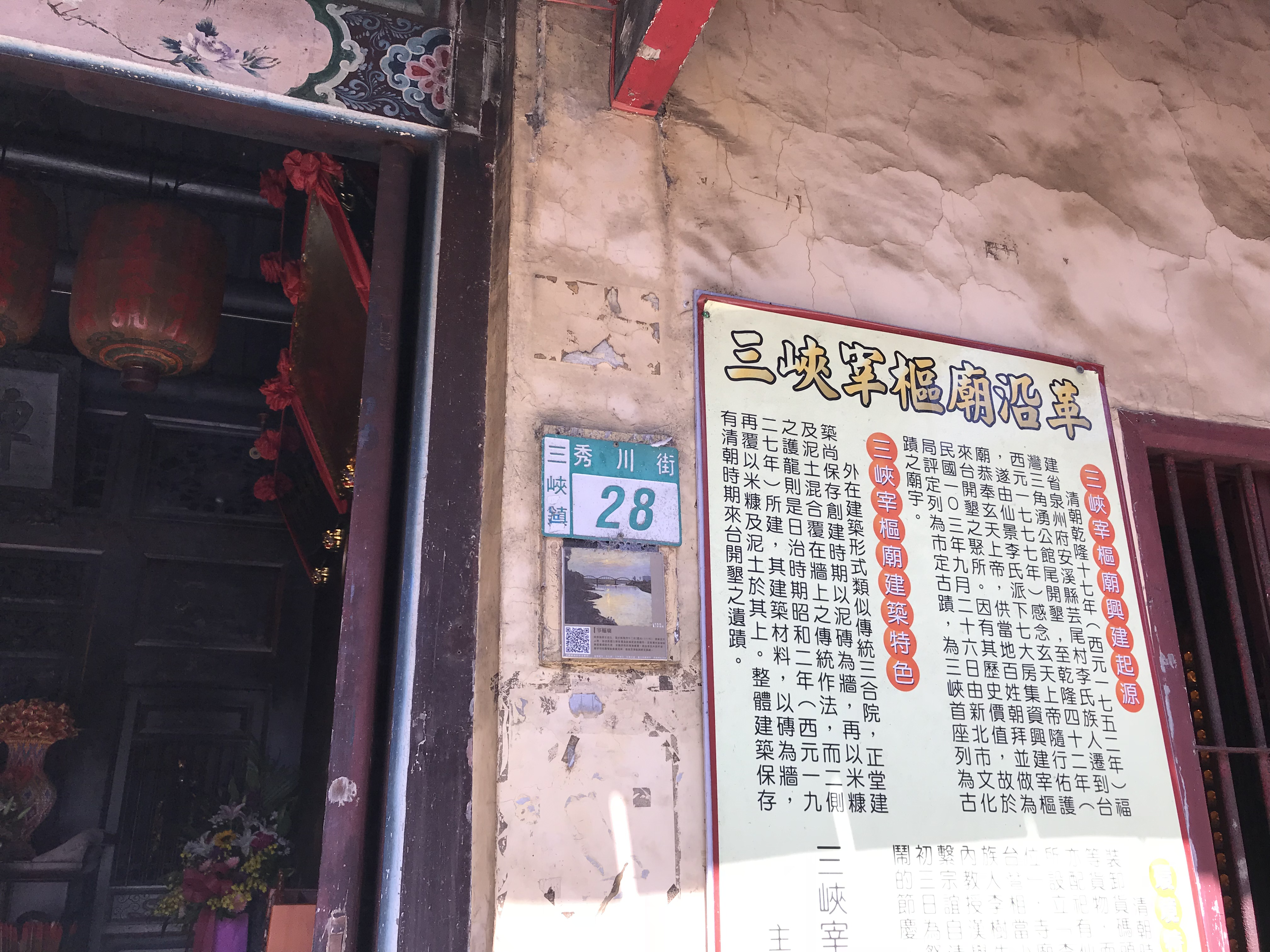 中文（台灣）: 三峽宰樞廟門牌號碼與沿革牌。